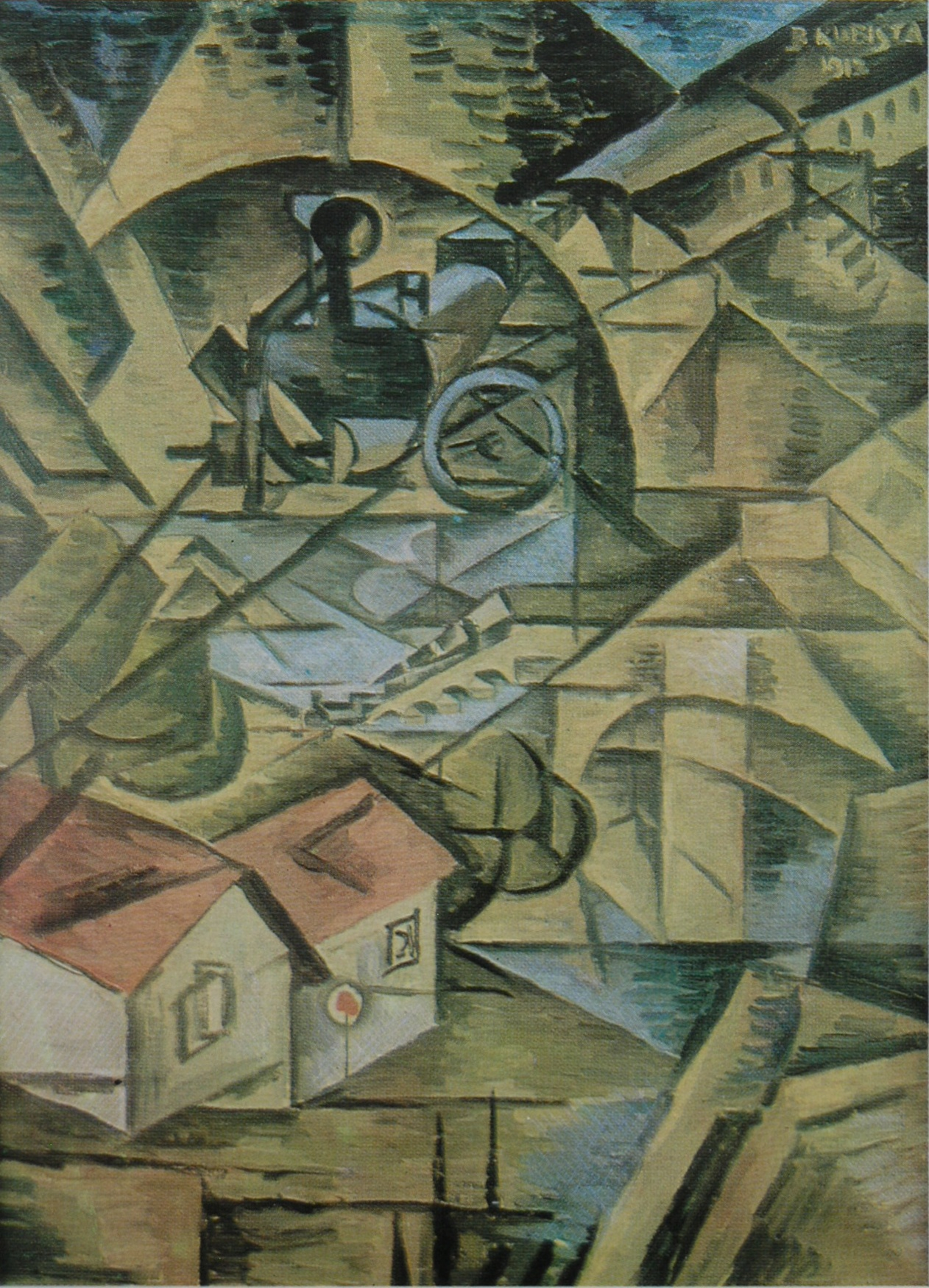 Vlak v horách (Tunel)